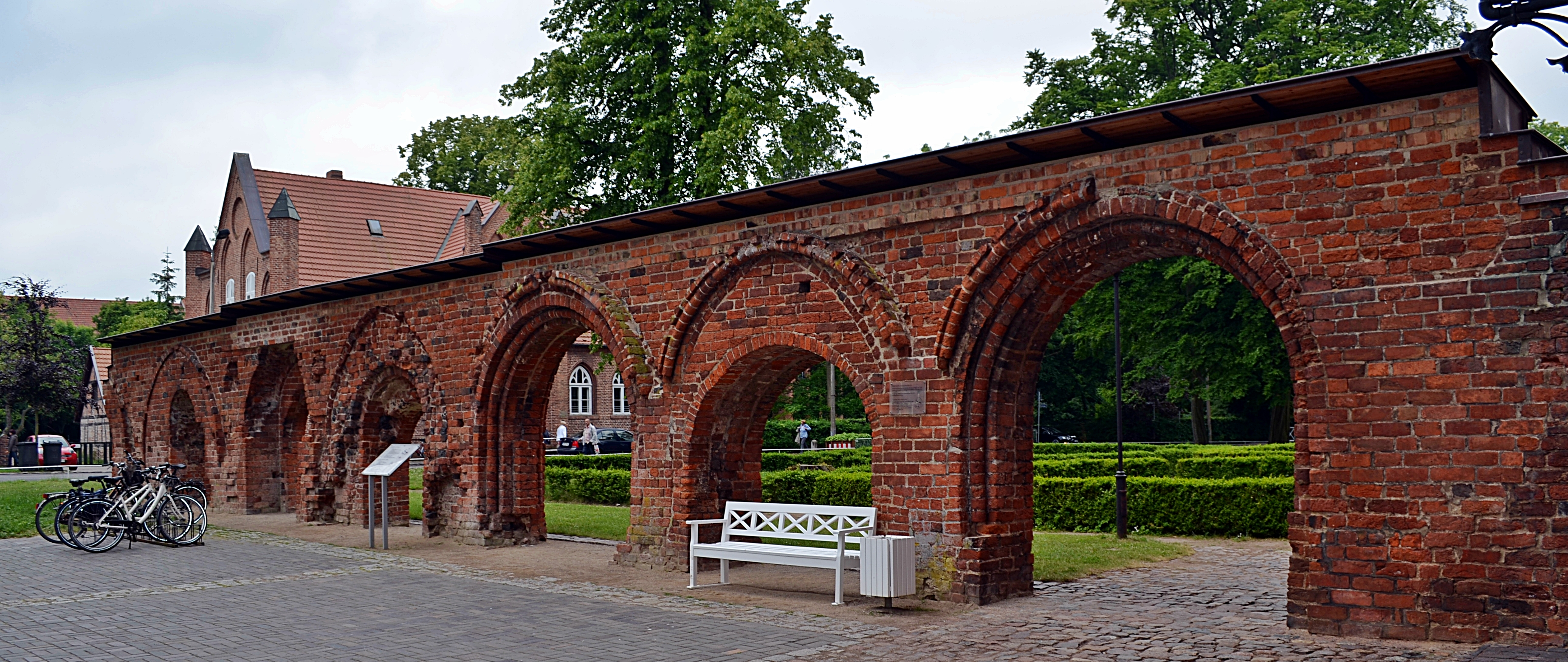 Bad Doberan, Münster, Außenansicht, Zwischenwand des Ostflügels der Klausur, frühes 13. Jh. 1. S